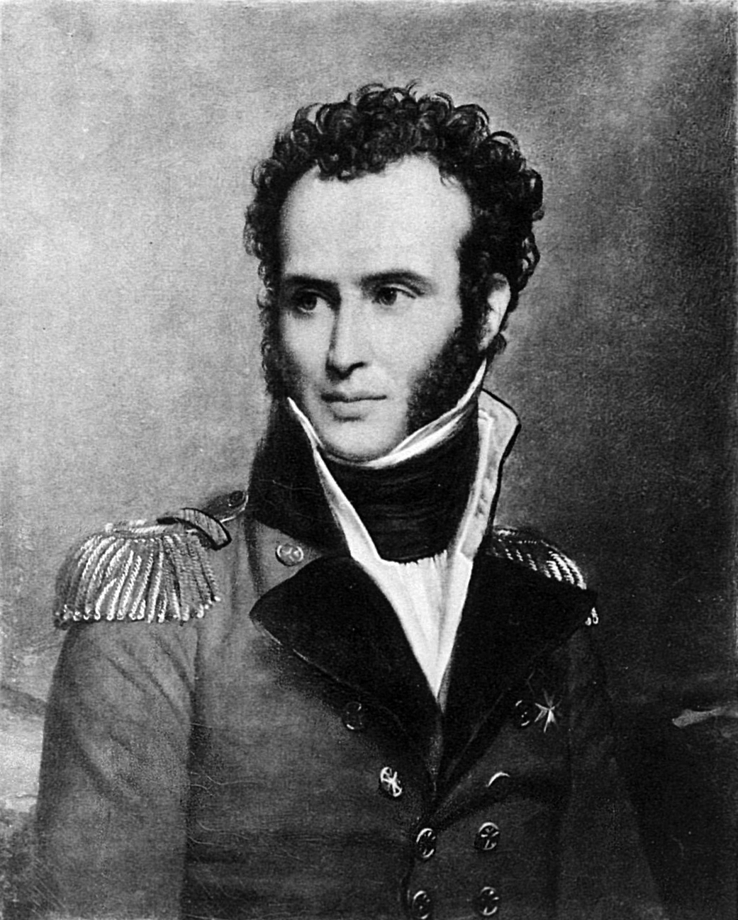 Князь Николай Сергеевич Гагарин (1786-1842)